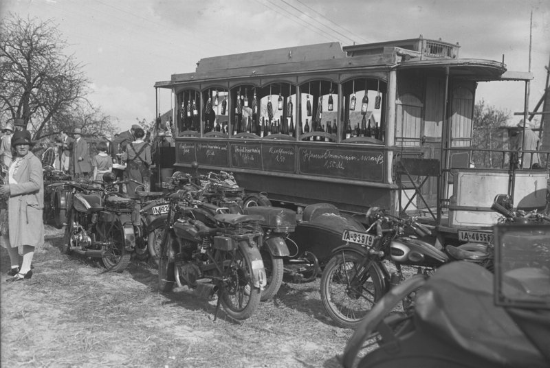 Zur Baumblüte in Werder an der Havel! Ein alter ausrangierter Strassenbahnwagen dient als Verkaufsstand für Obstwein. Information added by Wikimedia users.